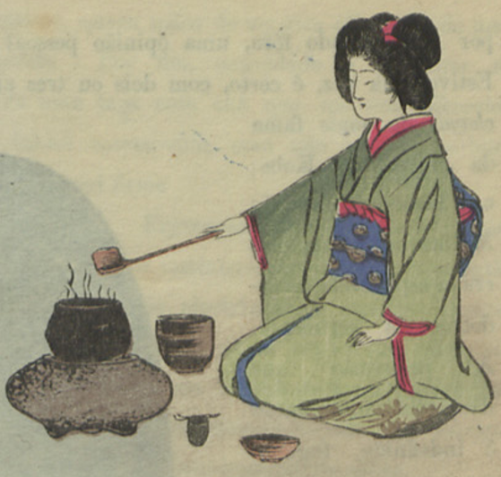 Ilustração na obra O culto do chá.